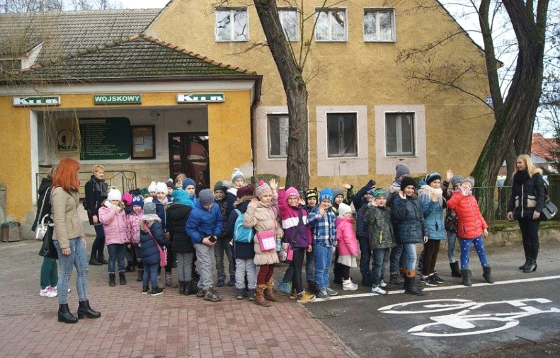 Klub wojskowy. Ferie zimowe